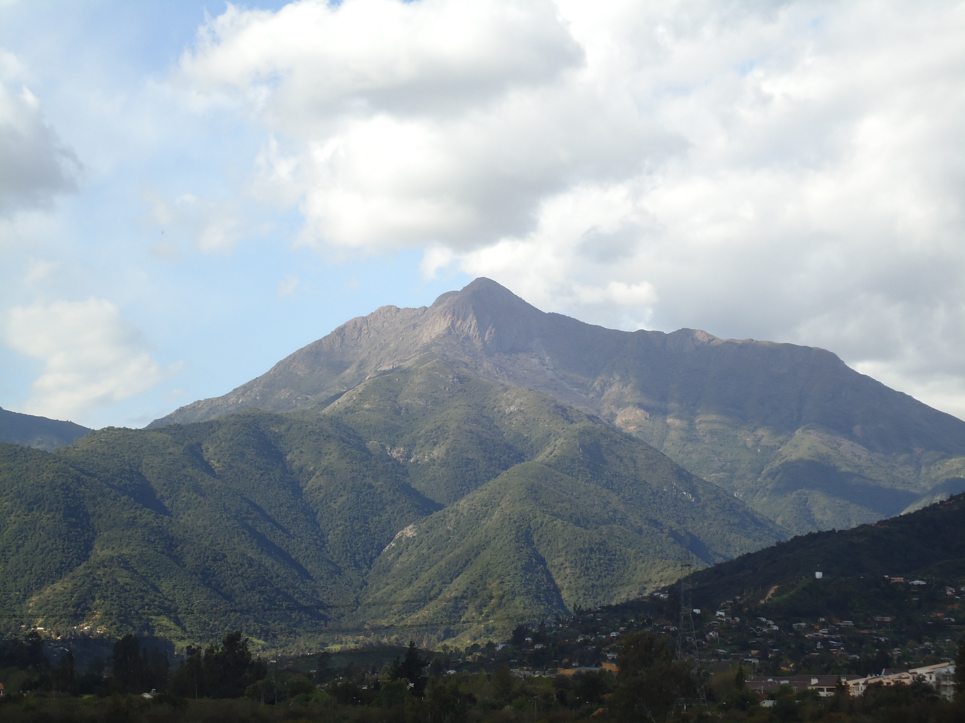 Vista del Cerro La Campana desde Pelumpén, Parque Nacional La Campana, Olmué, Chile.